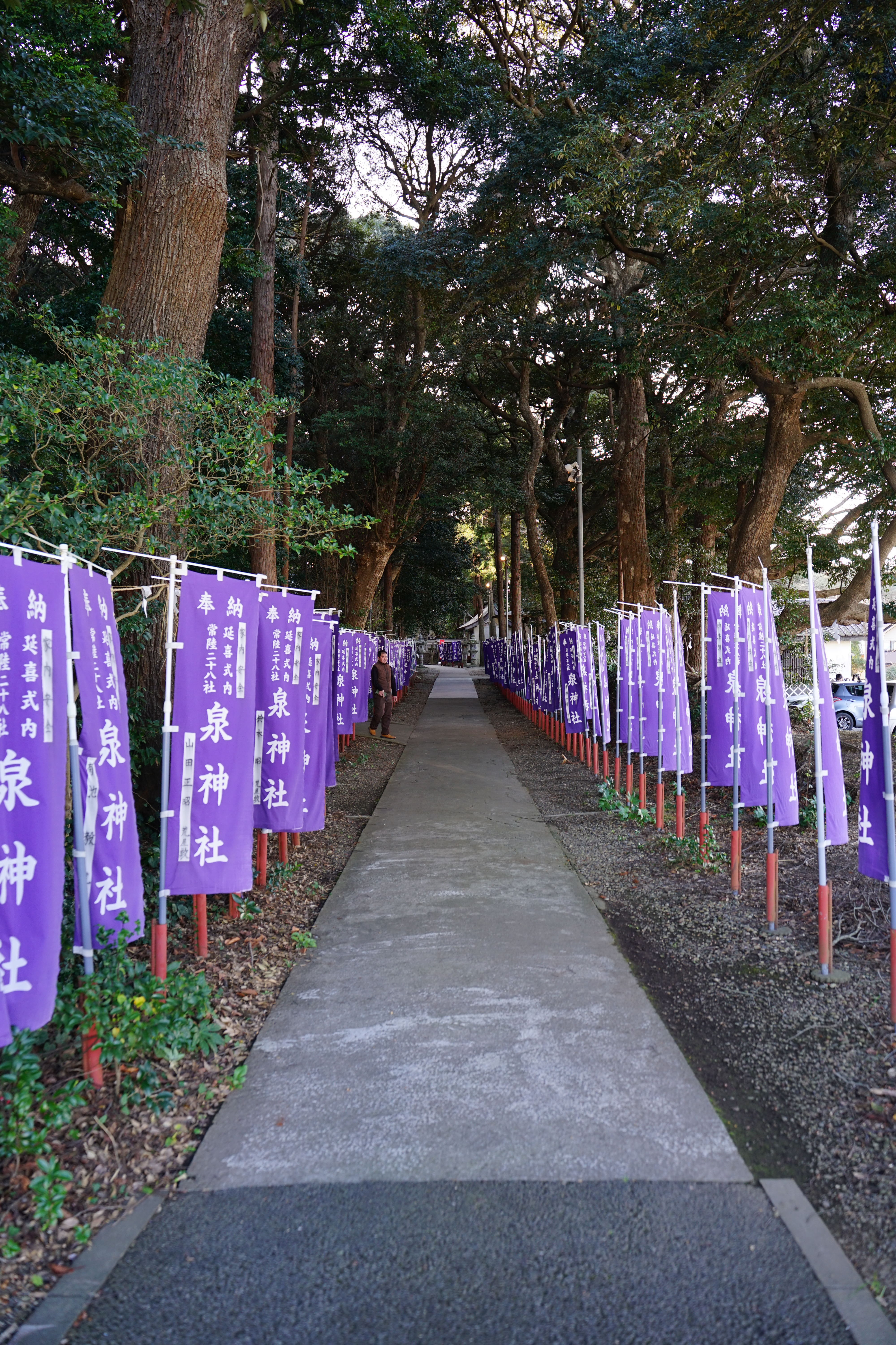 泉神社の参道（茨城県日立市）